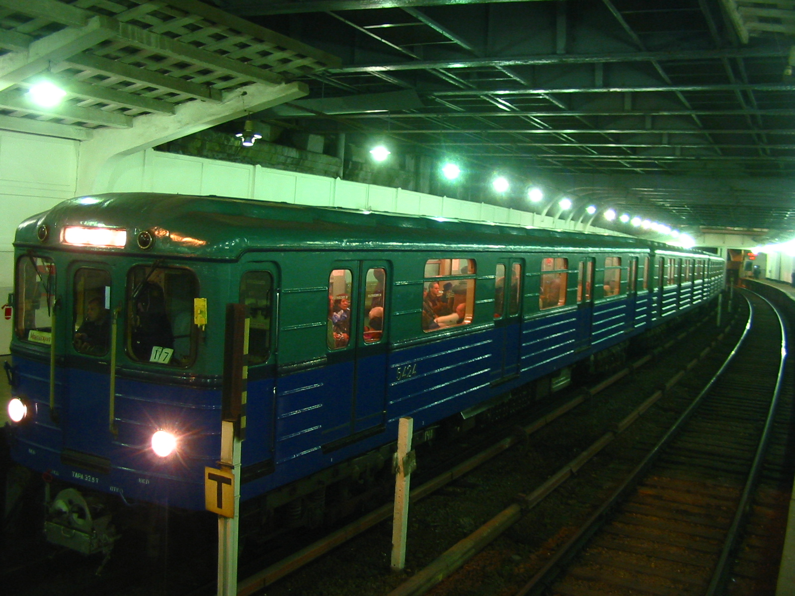 Moscow Metro Ez 5424 Kutuzovskaya station_20051104_178